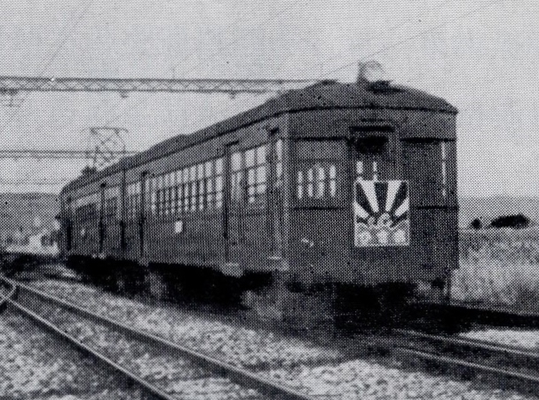 愛知電気鉄道の超特急「あさひ」。